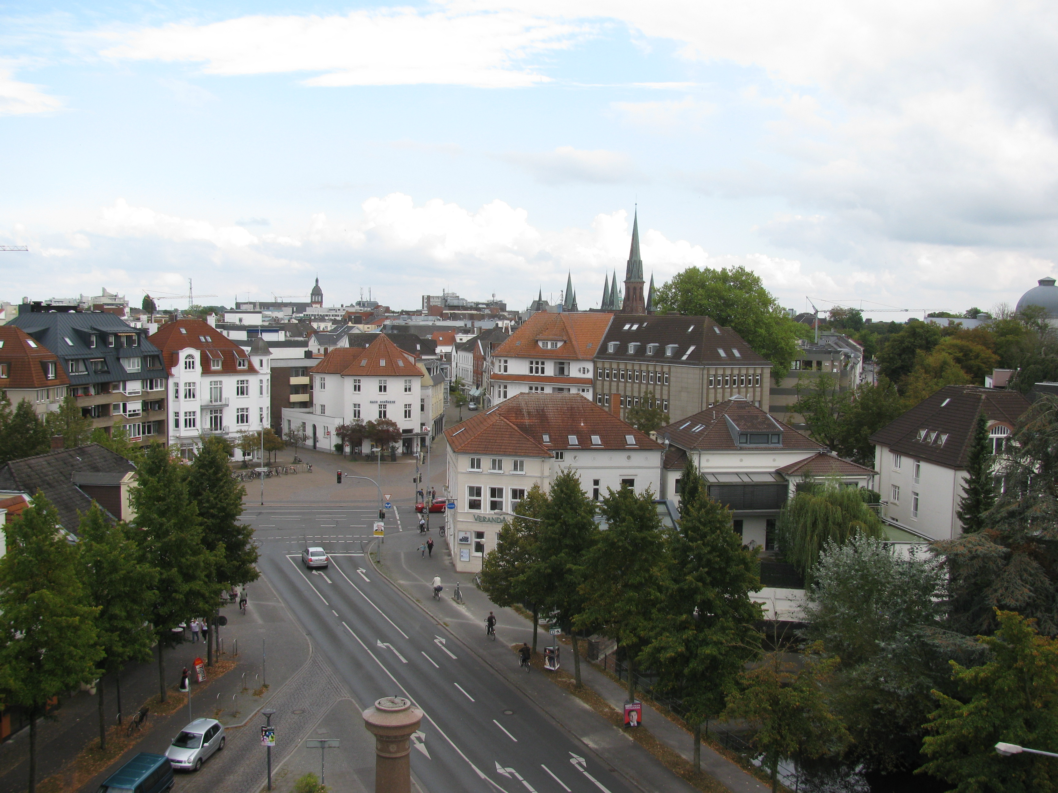 Oldenburg (Oldenburg). Blick vom Dachreiter der Friedenskirche über die Ofener Straße auf den Julius-Mosen-Platz und die historische Altstadt. Im Hintergrund die Kirche St. Lamberti.